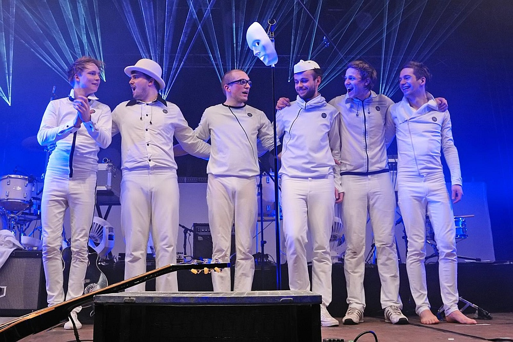 Bandbild von Polarkreis 18. Von Links nach Rechts: Silvester Wenzel, Uwe Pasora, Christian Grochau, Ludwig Bauer, Philipp Makolies, Felix Räuber